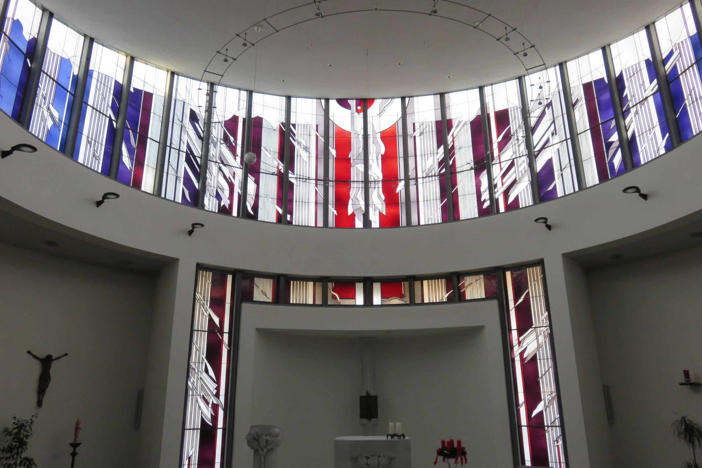 Kapelle Krankenhaus Maria von den Aposteln in Neuwerk